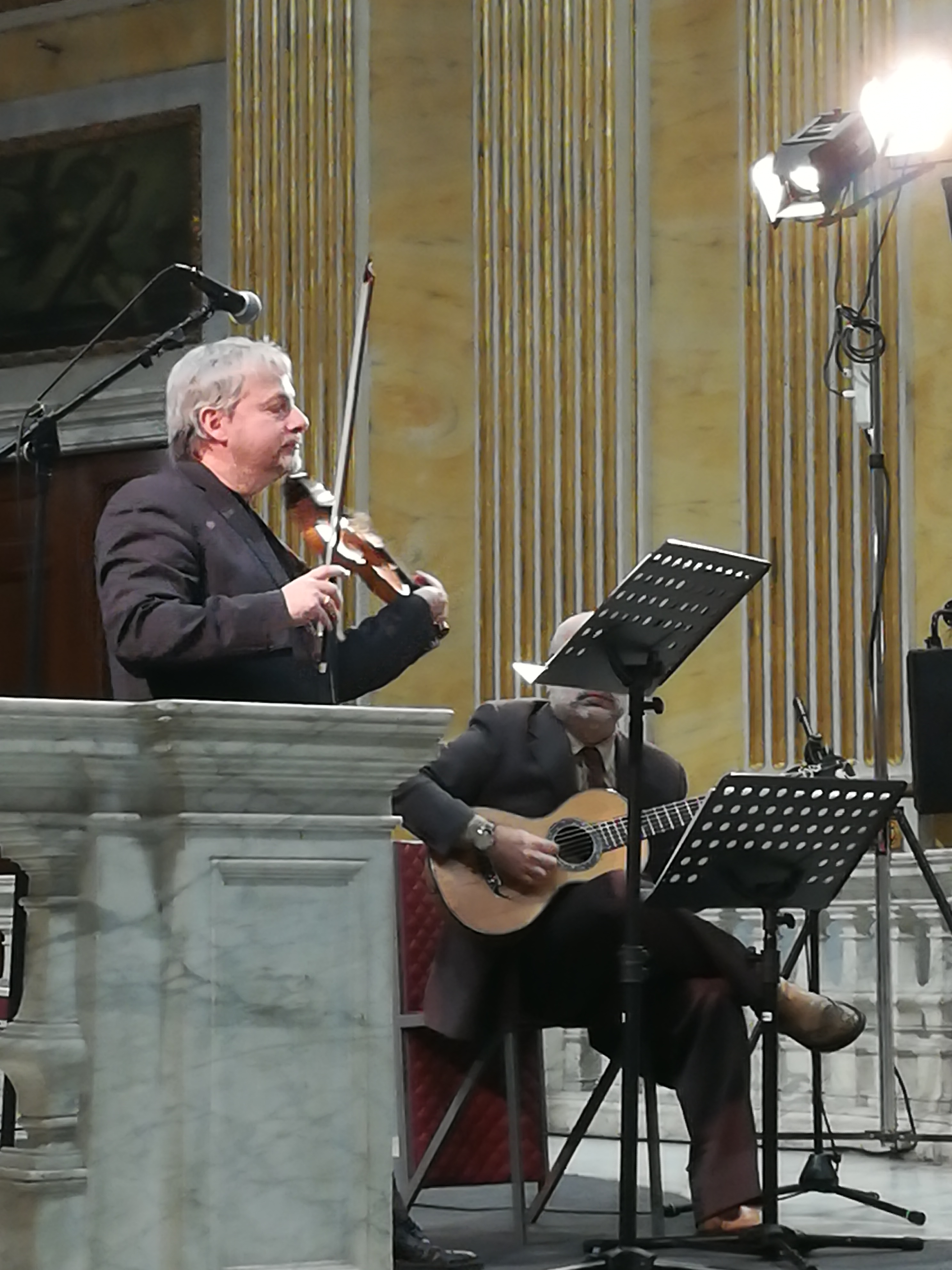 Fabio Biondi, Genova, Palazzo Ducale, febbraio 2019